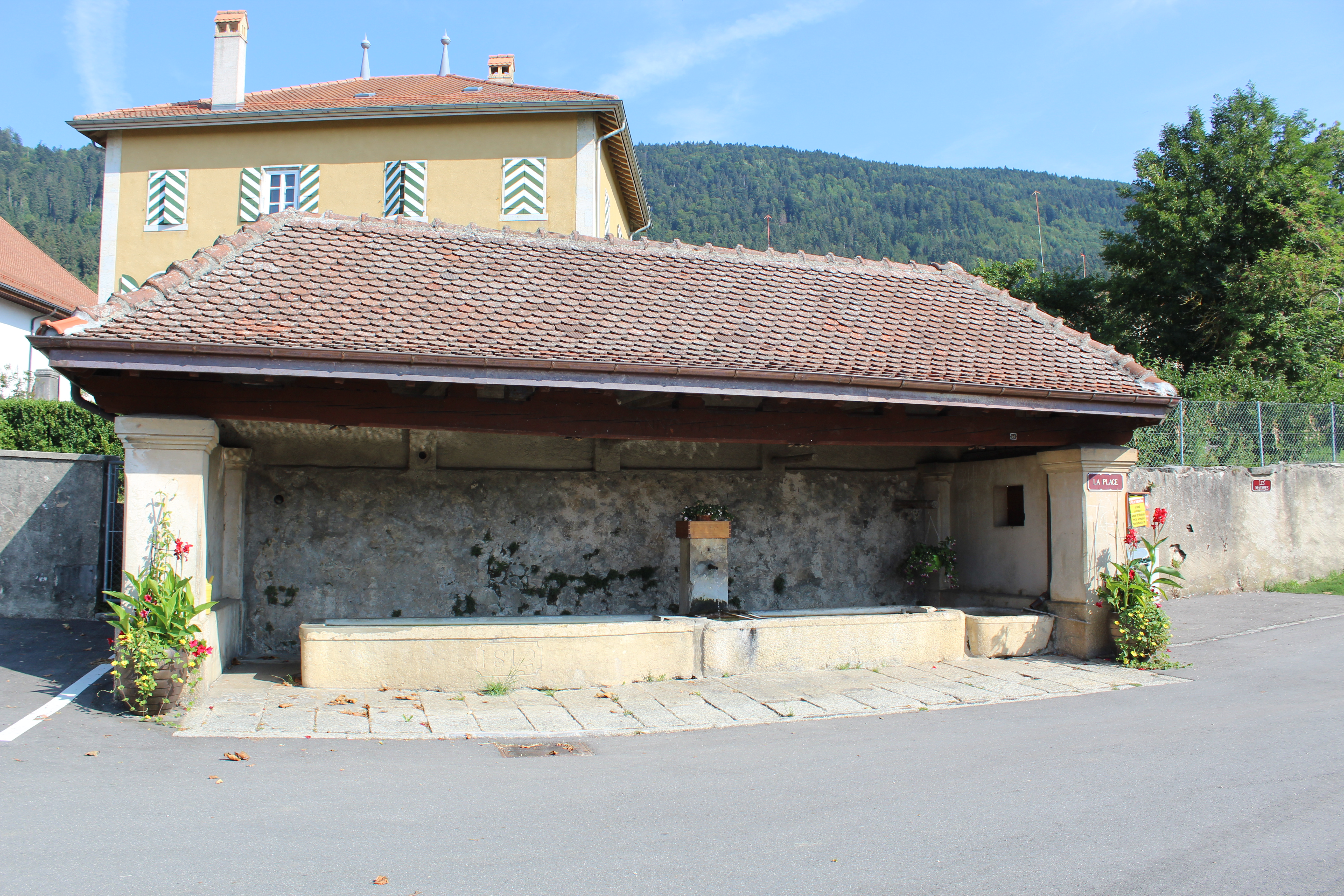 Le lavoir